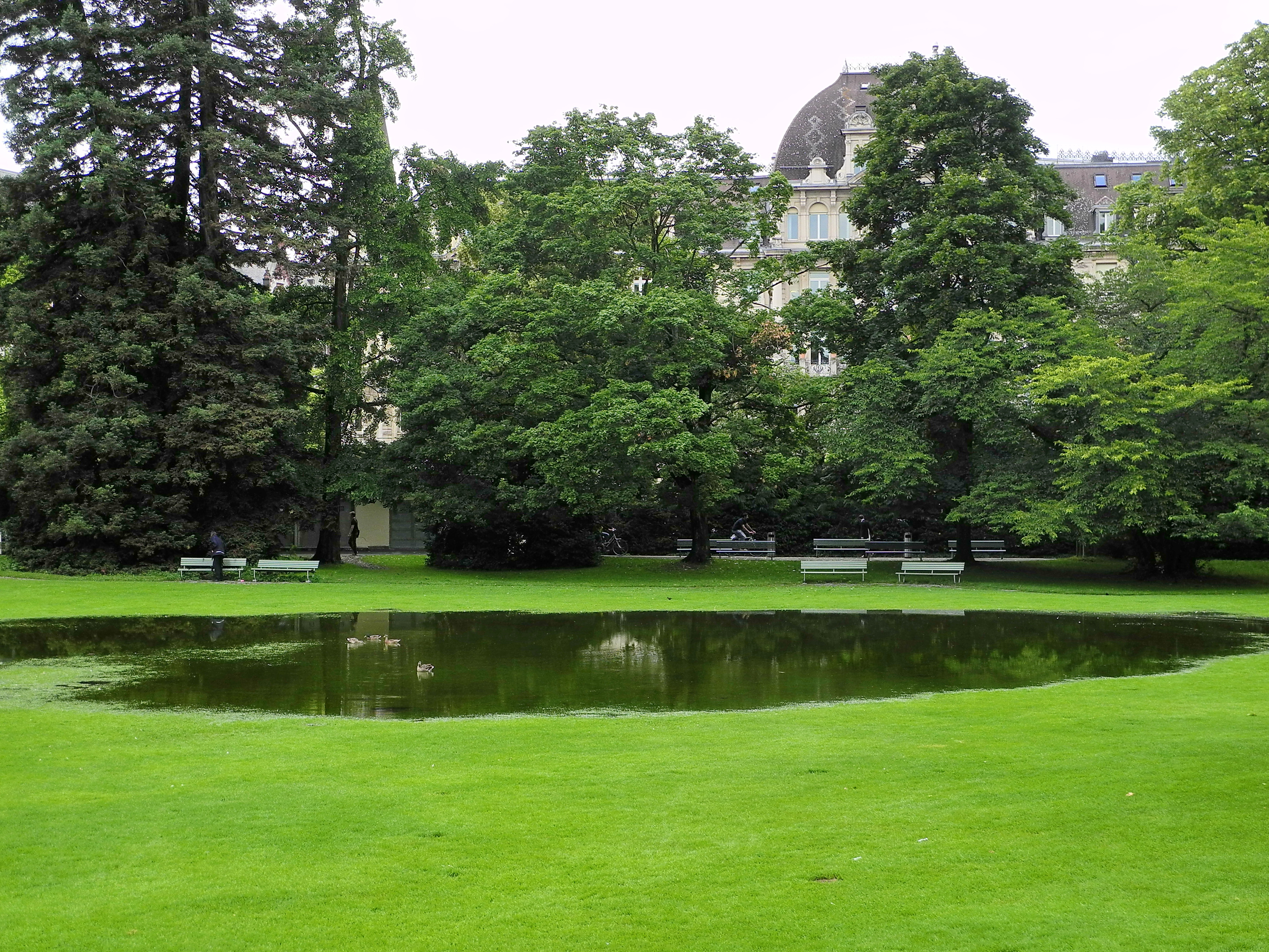 Arboretum in Zürich-Enge (Switzerland)